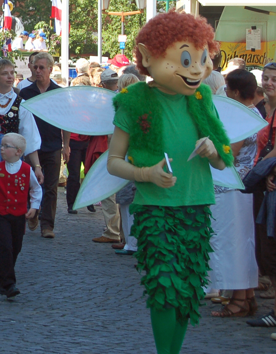 Das Maskottchen Birk der Landesgartenschau 2011 in Norderstedt beim Festumzug in Rendsburg beim Schleswig-Holstein-Tag 2010